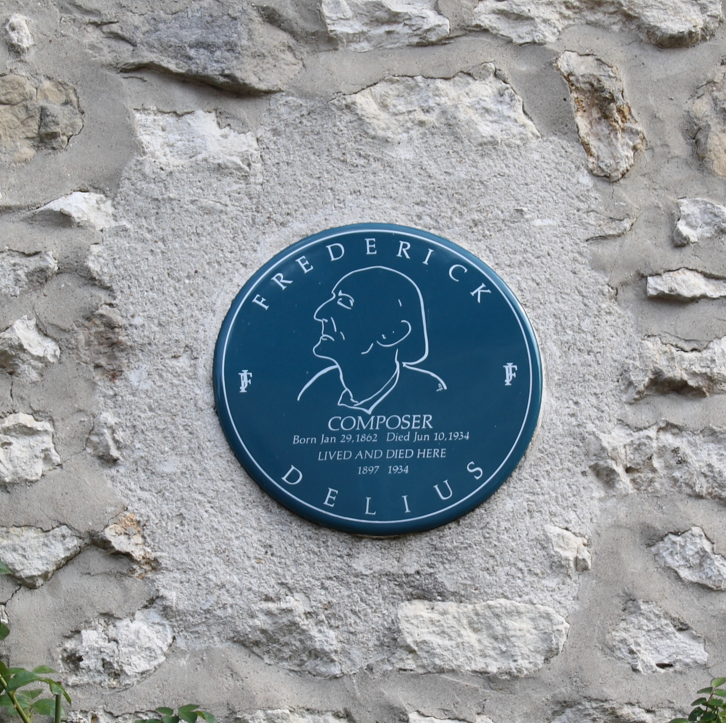 Gedenktafel für Frederick Delius an seinem Haus in Grez-sur-Loing im Département Seine-et-Marne (Île-de-France)